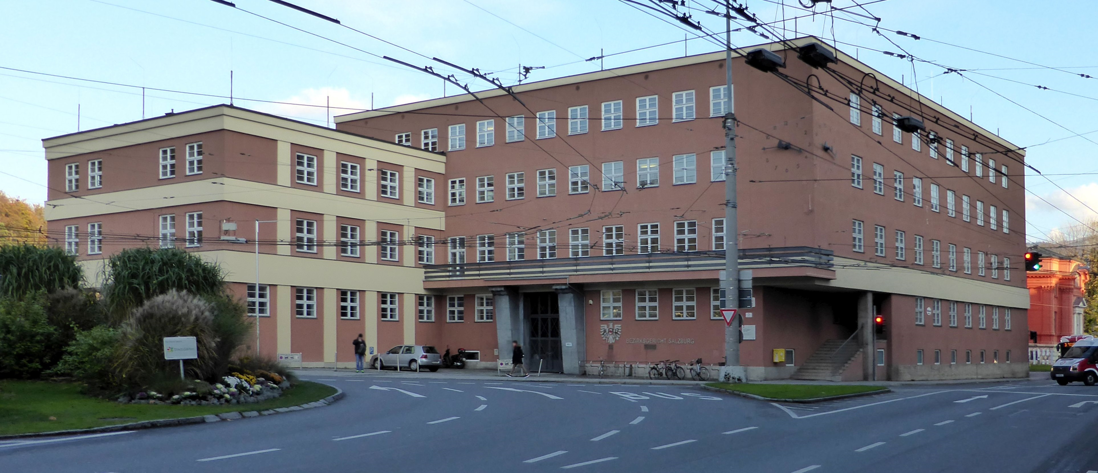 Stolpersteine Salzburg, Verlegeort Rudolfsplatz 3 - Bezirksgericht Salzburg.